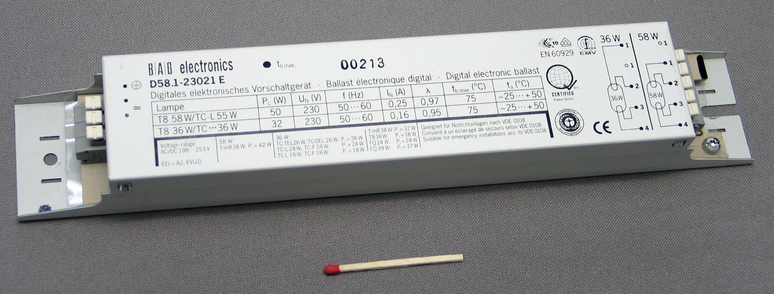 Elektronisches Vorschaltgerät für Leuchtstofflampen